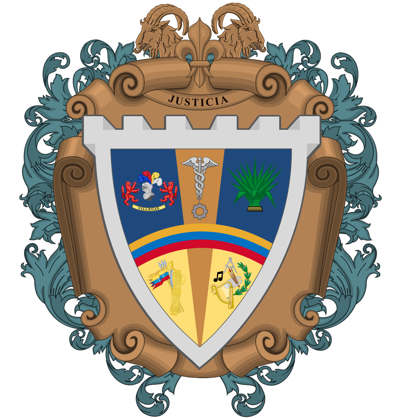 Escudo de Armas de Barquisimeto: Fue instituido con motivo de celebrase el cuatricentenario de la fundación de la ciudad. Se escogió a través de un concurso abierto por el Concejo Municipal, mismo en el que resultó como ganador el prototipo presentado por el artista plástico José Requena. Ostenta en cuartel superior derecho un campo azul y sobre este, la efigie del fundador de la ciudad Juan de Villegas, sostenida por dos leones rampantes. El haz dorado de la parte media simboliza al comercio y la rueda dentada dentro de este simboliza a la industria, elementos cardinales del desarrollo urbano. En el cuartel superior izquierdo, también azul, hay un árbol de sisal, el cual abunda en la meseta barquisimetana. En la parte media horizontal del escudo, un arco con el tricolor nacional da paso a los rayos solares que bañan los cuarteles inferiores donde se encuentran a su vez las armas de la ciudad representado por pabellones, alabardas, una brillante espada y una funda repleta de flechas, en contra posición se simbolizan las artes y la riqueza espiritual de los barquisimetanos por medio de una lira, una paleta, un pentagrama, un compás y una corona de laurel. Todo el perímetro del escudo está envuelto por un arabesco barroco y en la parte superior a manera de corona, una fortaleza en la que se sostiene una cinta con la palabra “justicia” y sobre ella dos cabezas de macho cabrío saliendo de un anillo.